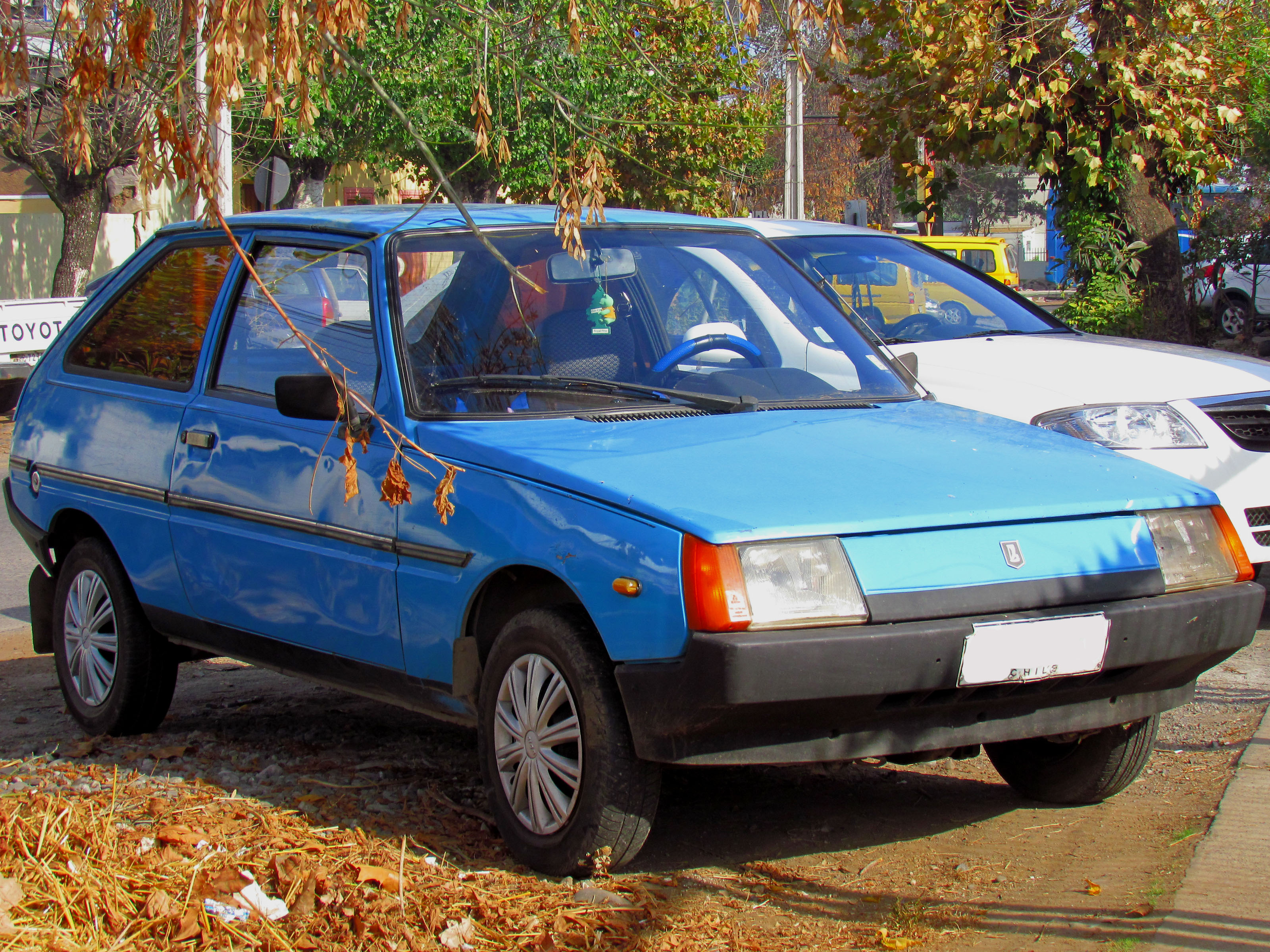 ZAZ Tavria 1102 1991